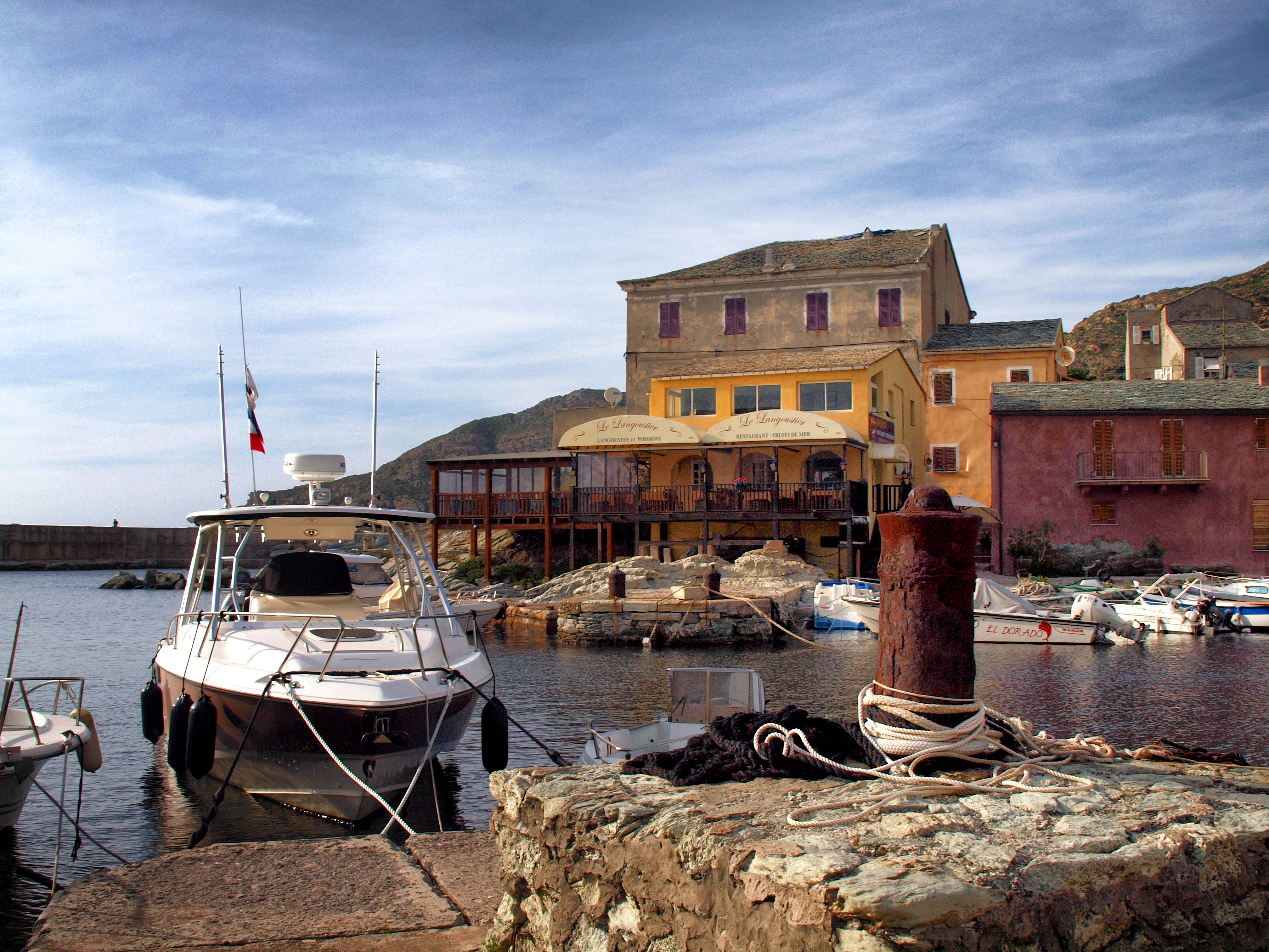 Centuri, Cap Corse - Les canons à l'entrée du petit port de pêche